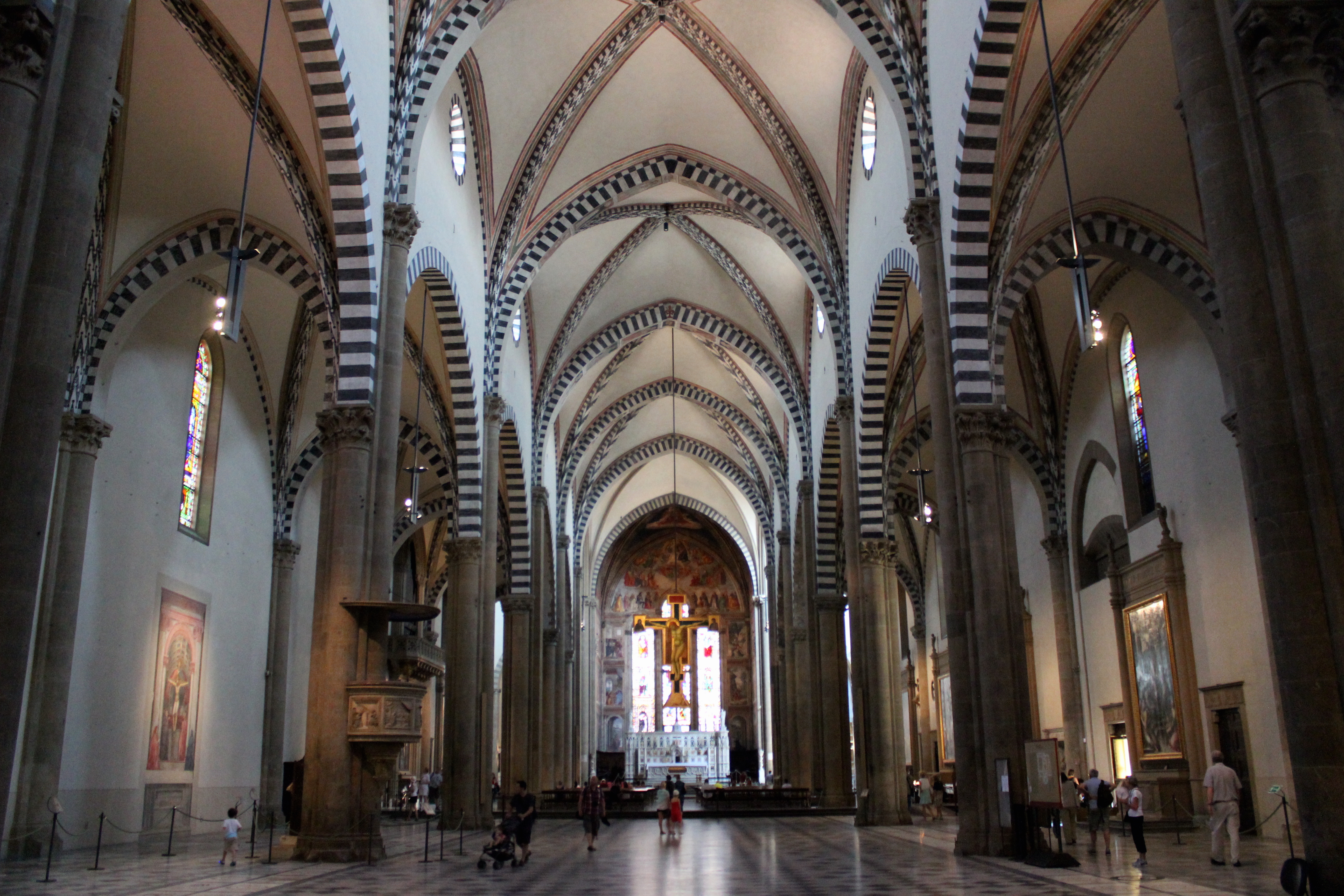 Florencia. Santa Maria Novella. Interior.